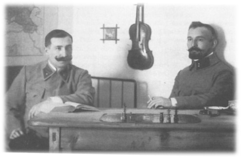 J. Kroutil při hře v šachy v ruském zajateckém táboře Chvalinsk 19. 3. 1916, v den svých jmenin; vedle něho na stěně obrázek jeho rodiny a jeho housle